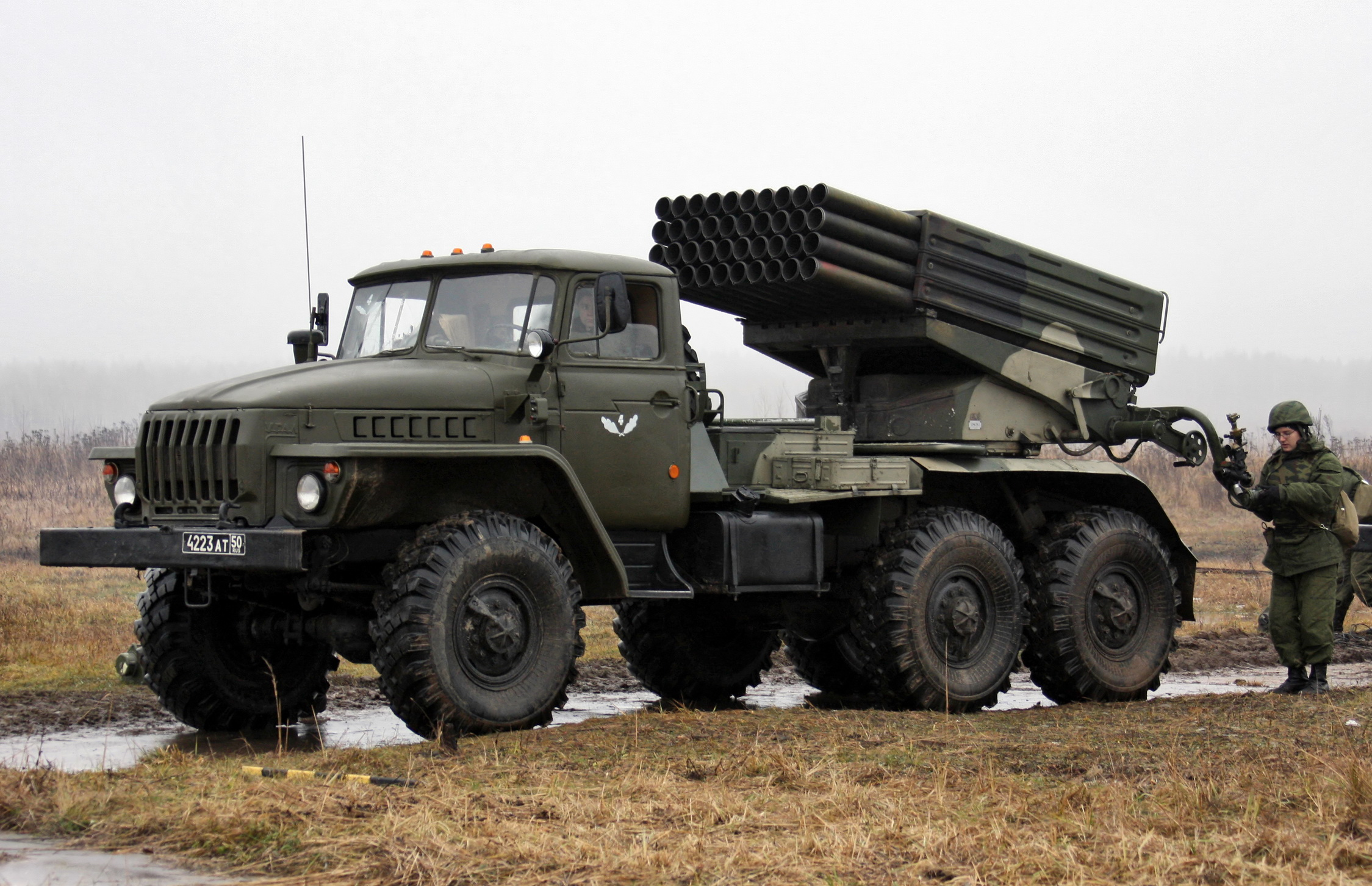 Батарея БМ-21 РСЗО Град из состава реактивного артиллерийского дивизиона бригады (Exercises with BM-21 9K51 Grad MLRS battery)